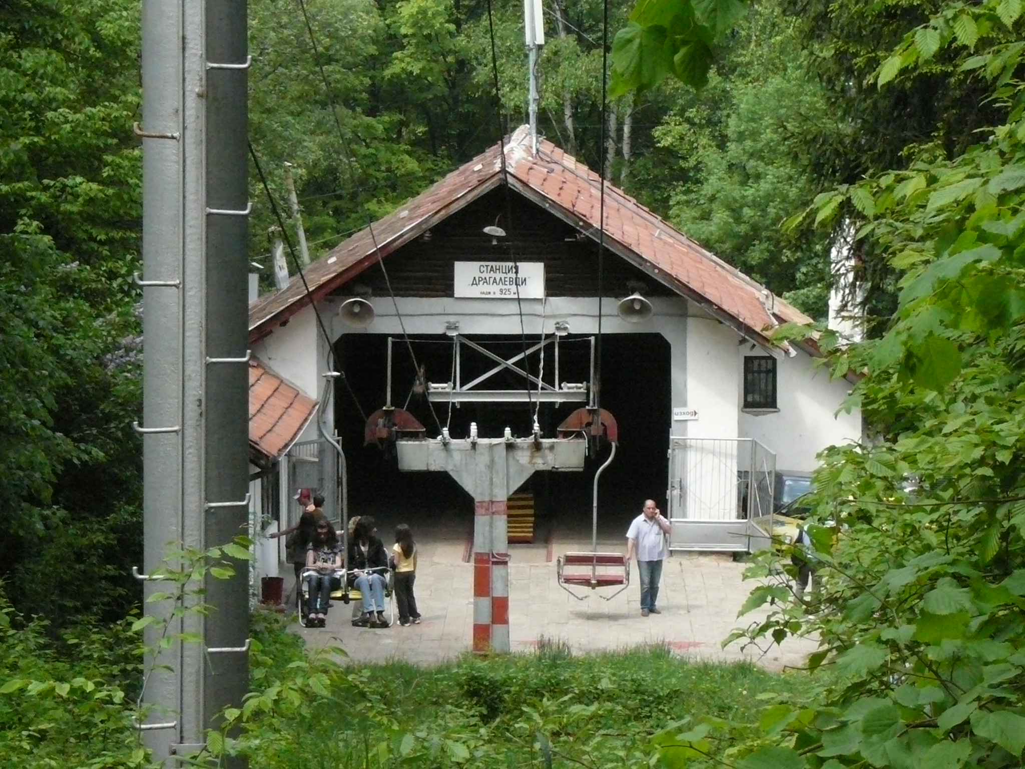 Dragalevtsi,Sofia,Bulgaria